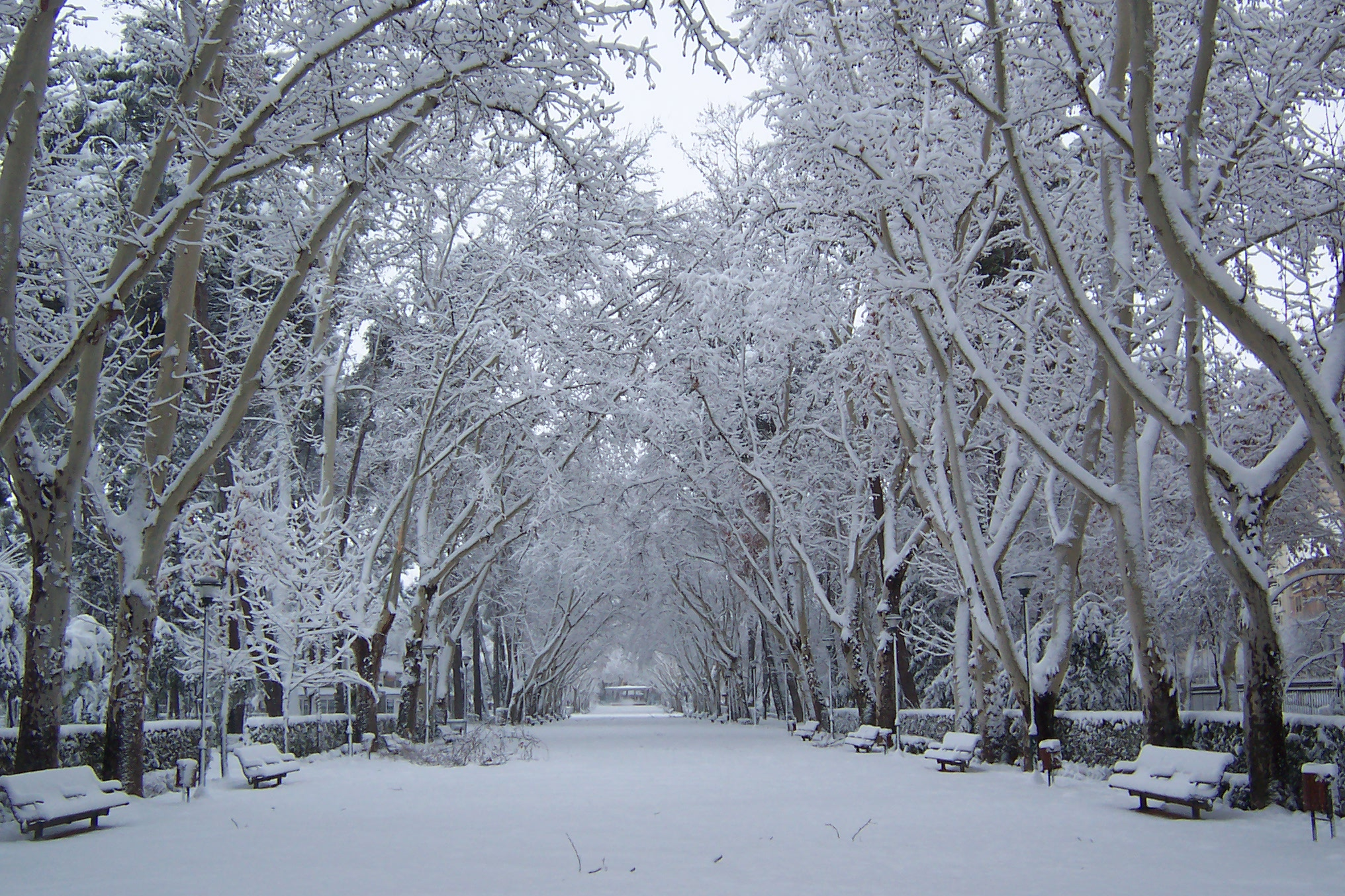 Parque de Abelardo Sánchez (Albacete) nevado en la mañana del 28 de enero de 2006.